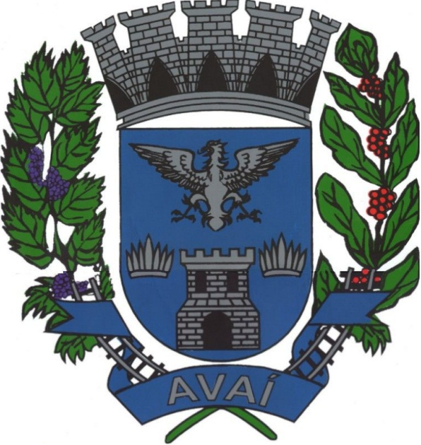 Brasão de Armas do município de Avaí - SP - Brasil.